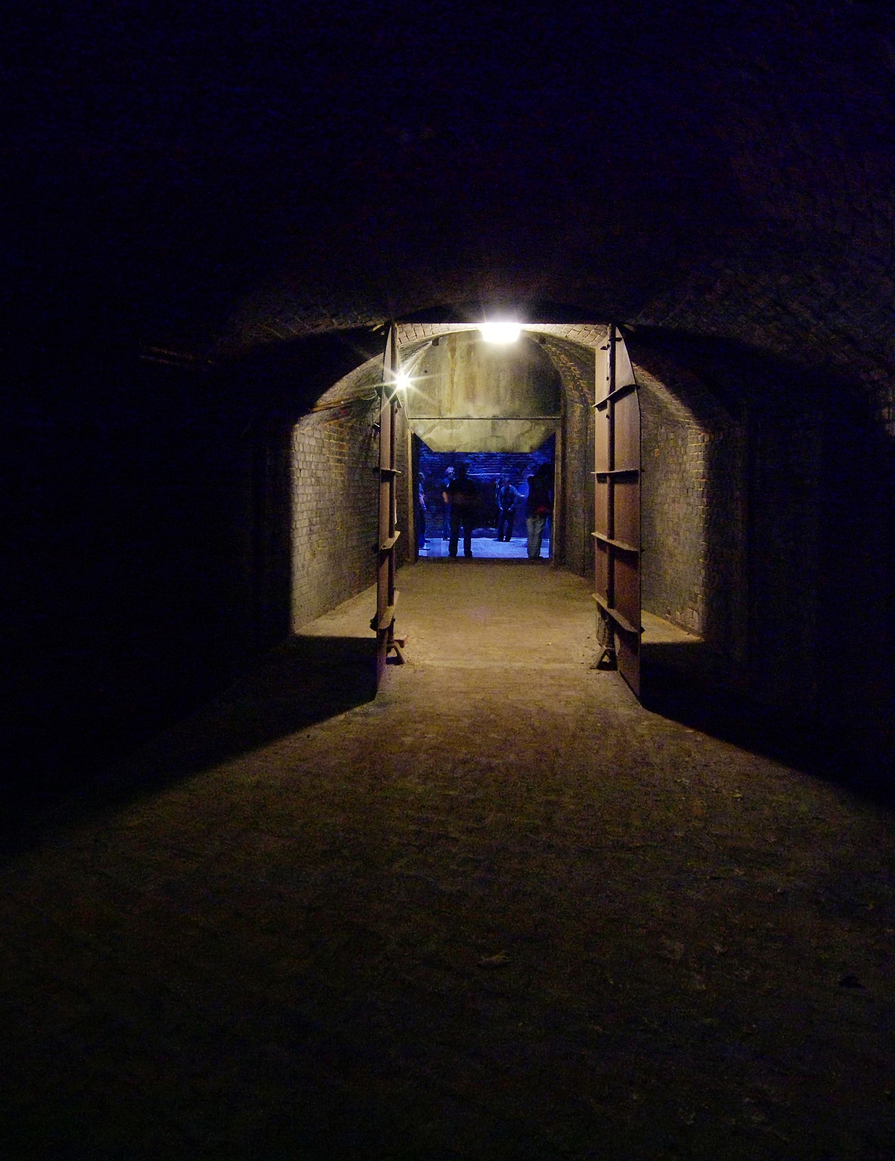 Kokerei Zollverein, Essen, Drosselklappen im sog. Fuchs, im Hintergrund eine Besuchergruppe am Grund des Kamins, durch Himmelslicht schwach erleuchtet und wegen des Weißabgleichs stark blaustichig abgebildet.